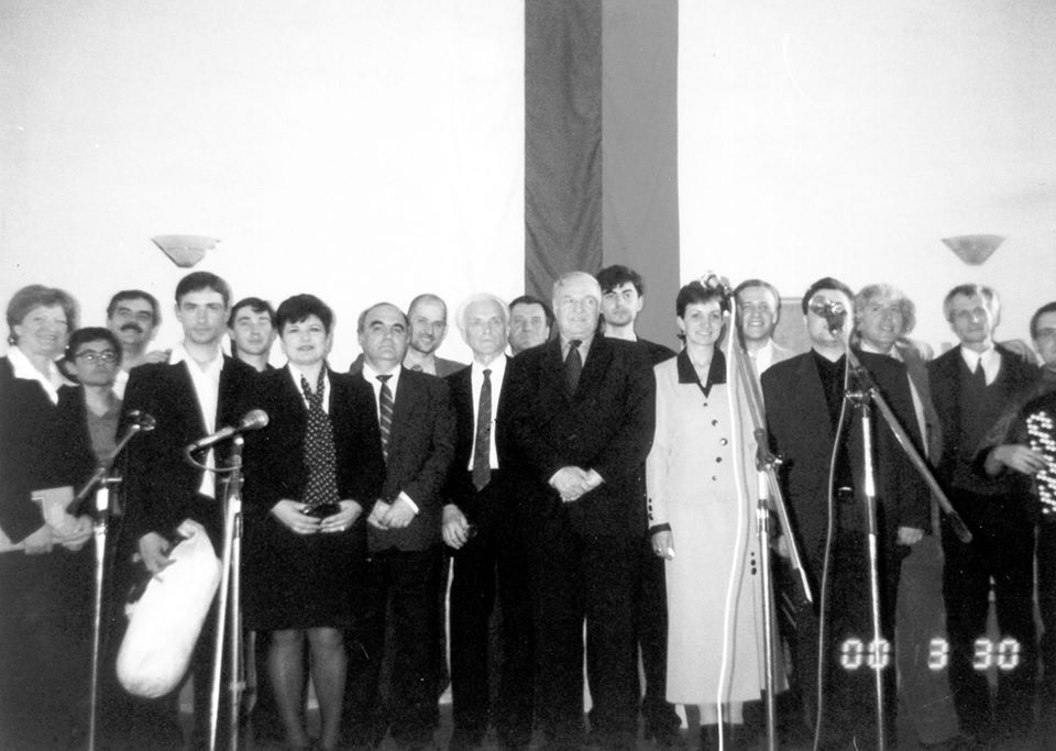 Отбелязване на 10-годишнината на Дружество "Родолюбец", София, 2000г. Снимка: редакция Роден край, Одеса